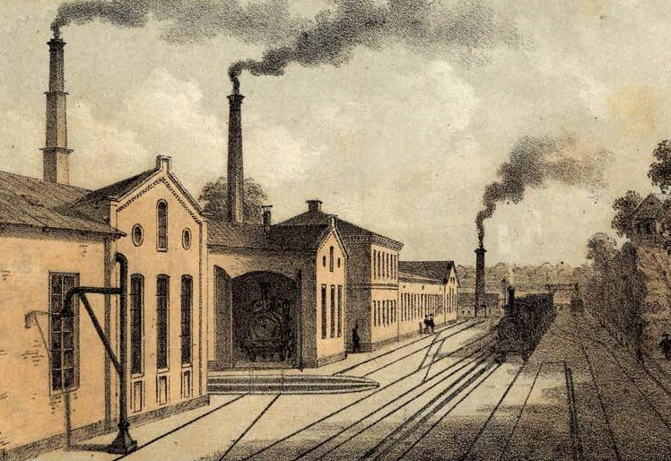 Järnvägens mekaniska verkstad Liljeholmen 1890-tal